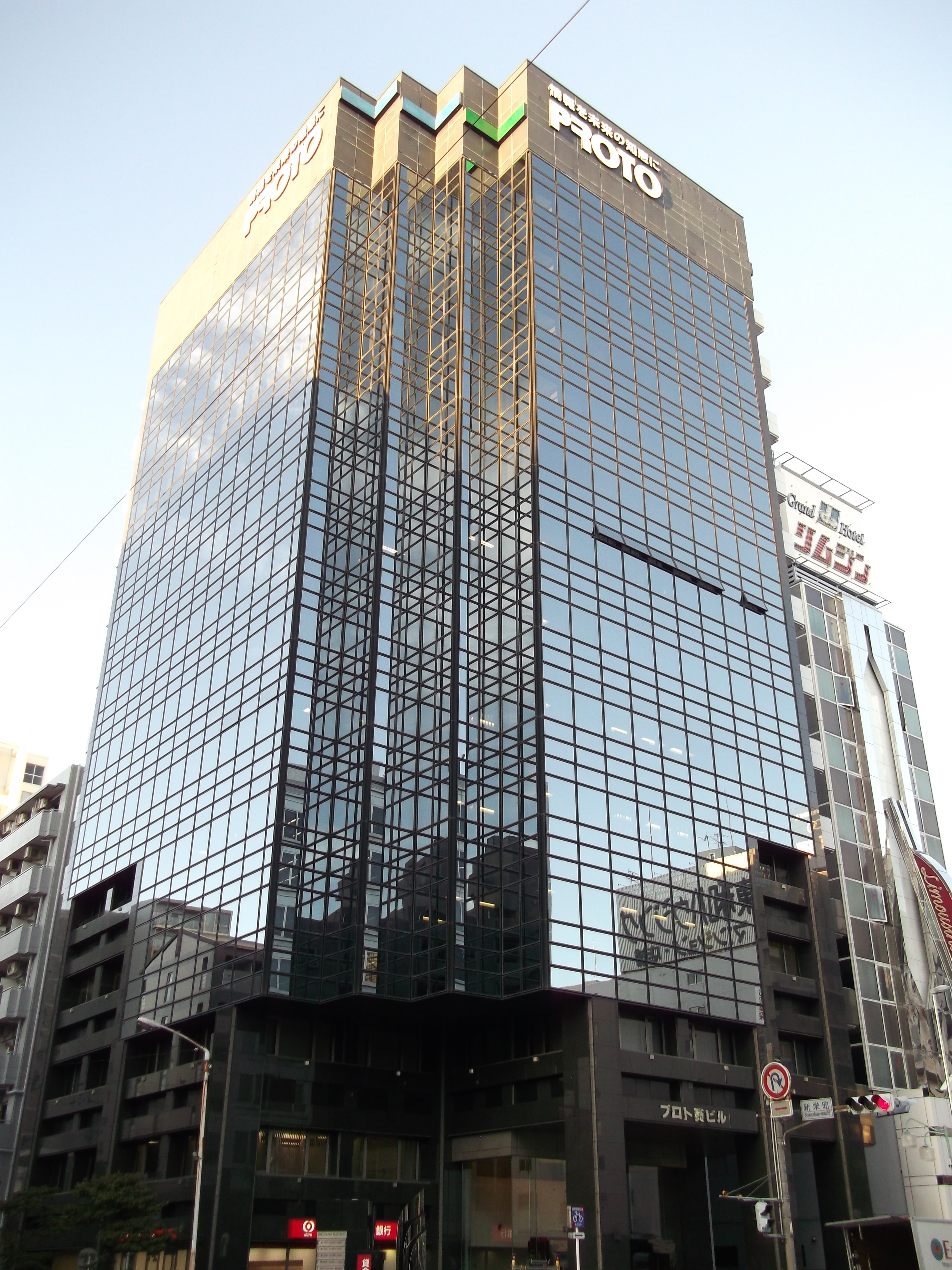 名古屋市中区葵一丁目のプロト葵ビル（プロトコーポレーション本社）を南西角から撮影